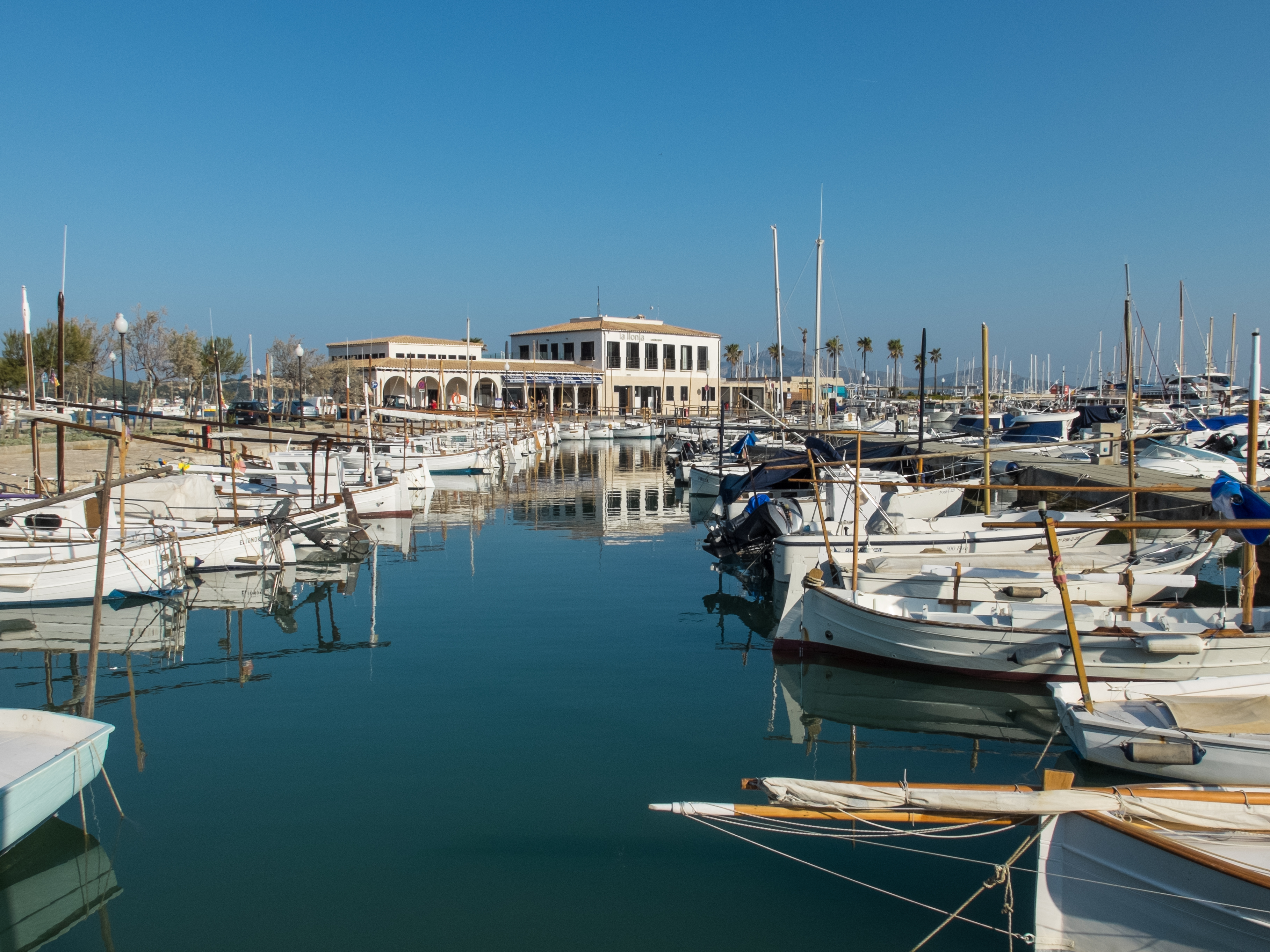 Port de Pollença, Mallorca